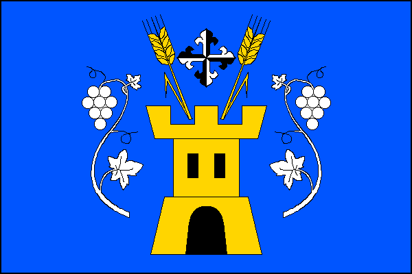 vlajka, Tvořihráz, okres Znojmo